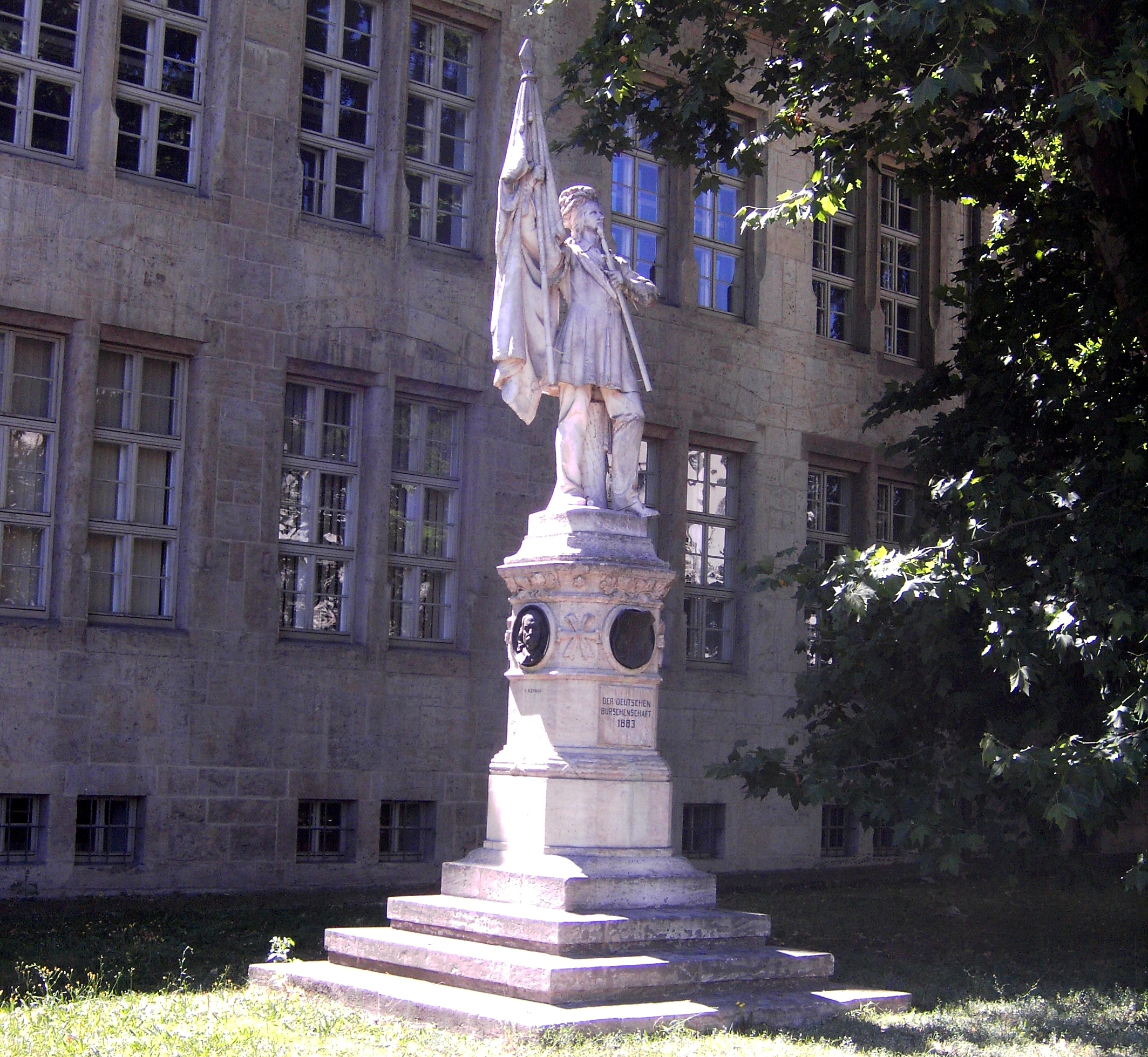 Urbuschenschaftsdenkmal in Jena, Denkmal für die Urburschenschaft und ihre Gründer errichtet auf dem Eichplatz am 2. August 1883, seit September 1951 vor dem Universitätshauptgebäude in Jena